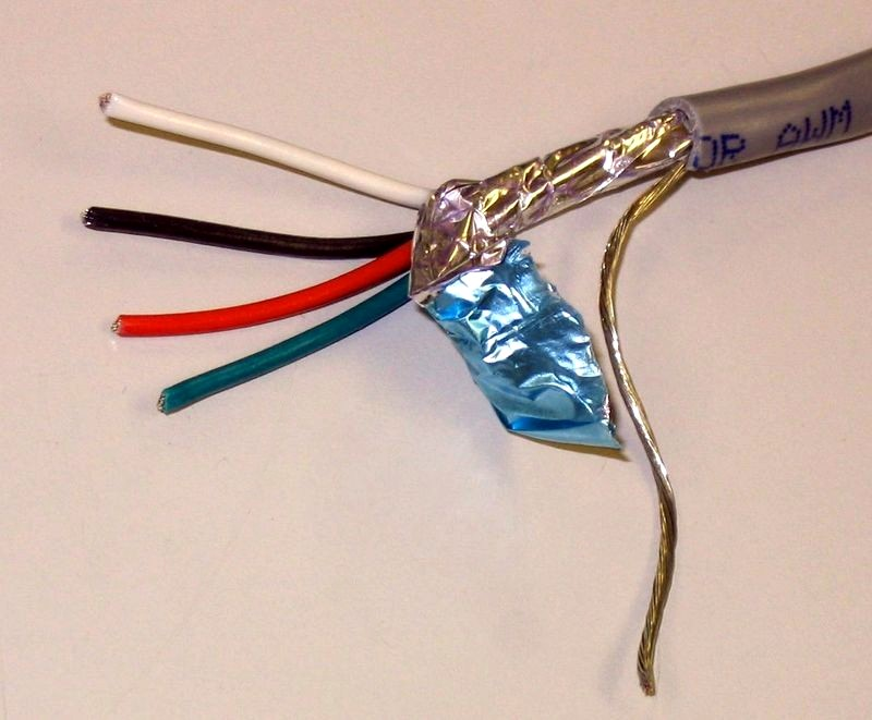 Stineny kabel